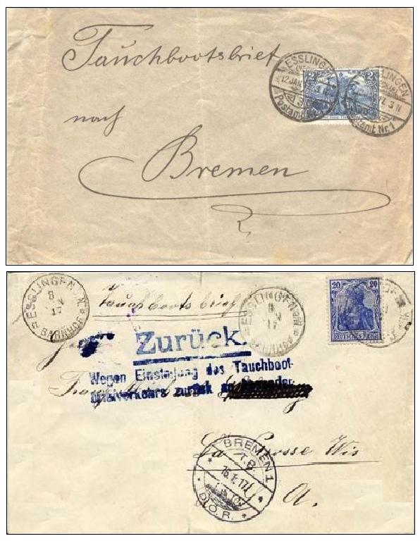 Im ersten Brief, Porto 2 RM, war der Tauchbootbrief einzusenden. Als dann die Fahrt nicht stattfand, wurde der Tauchbootbrief an den Absender zurückgeschickt.